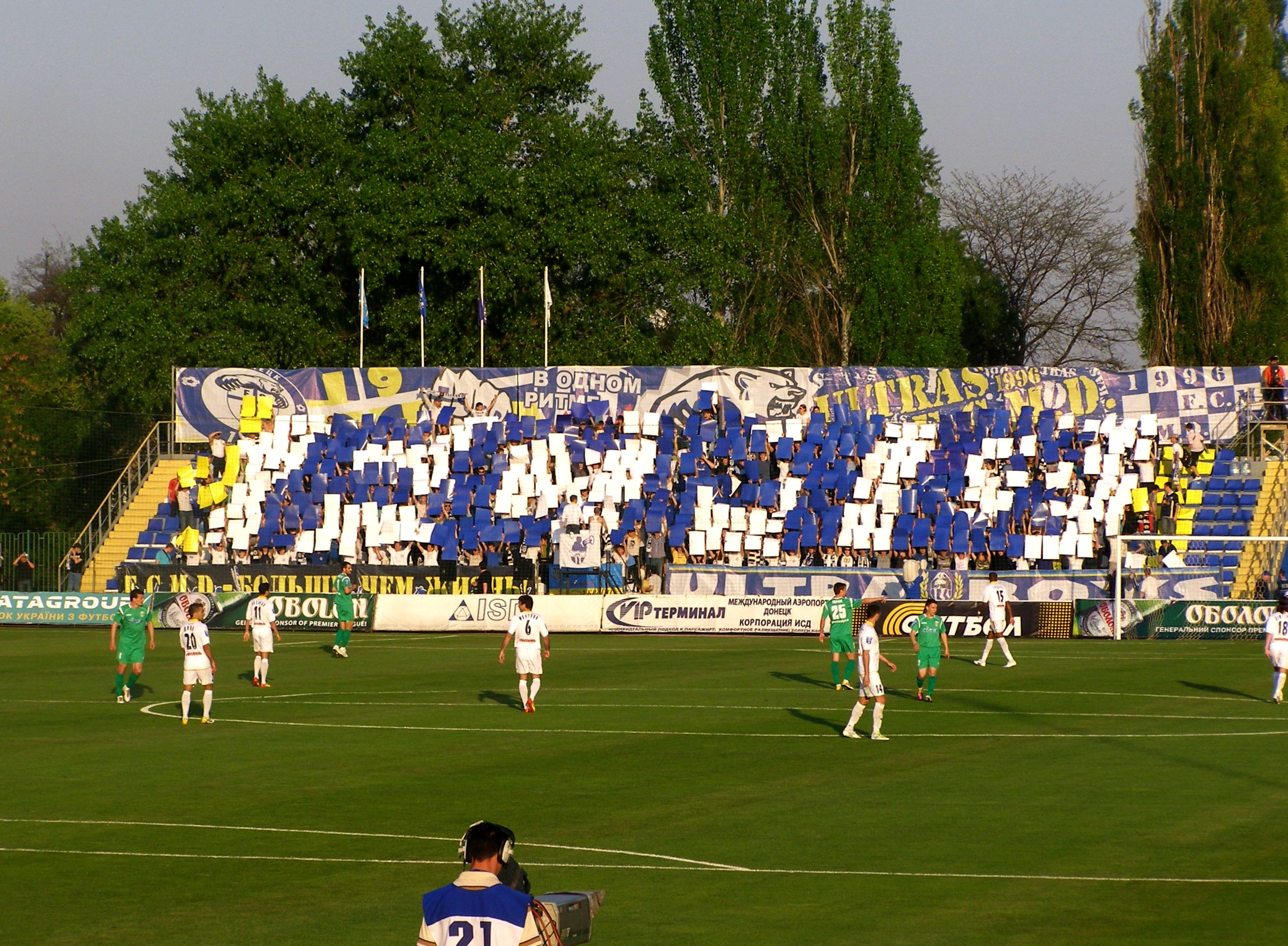 Модульне шоу ФКМД